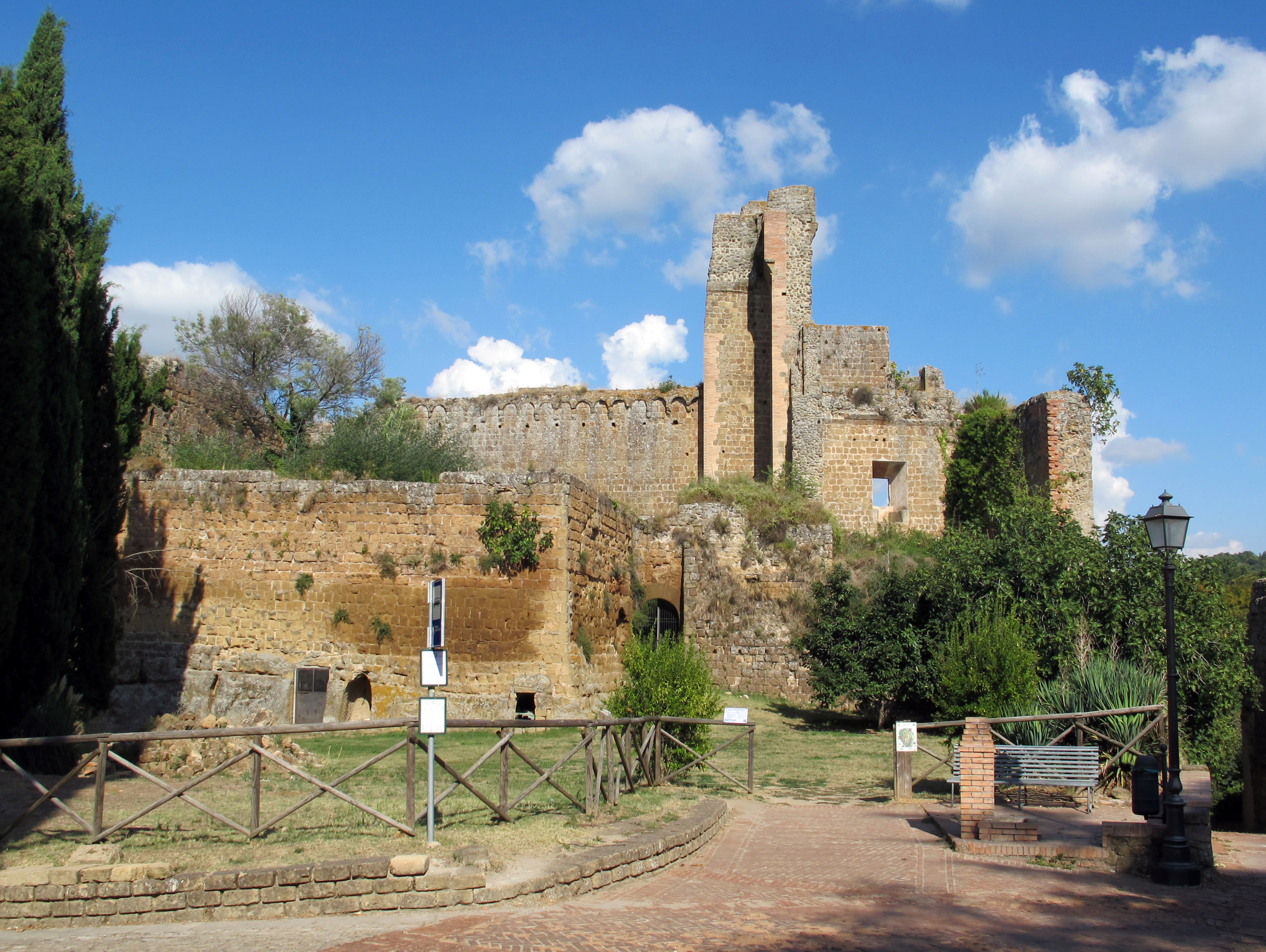 Sovana